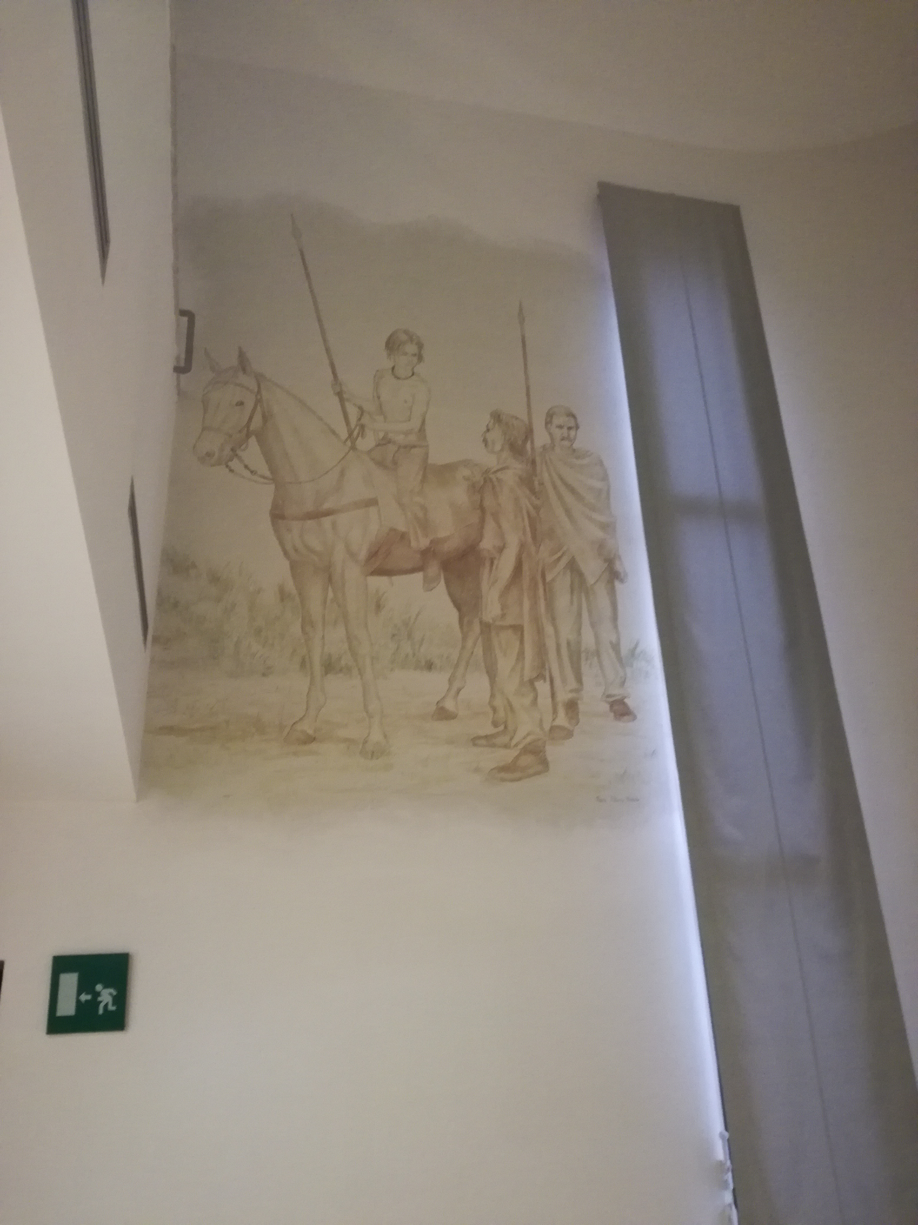 Secondo affresco nella parete di sinistra della sala della Tomba della biga al Museo archeologico di Adria.